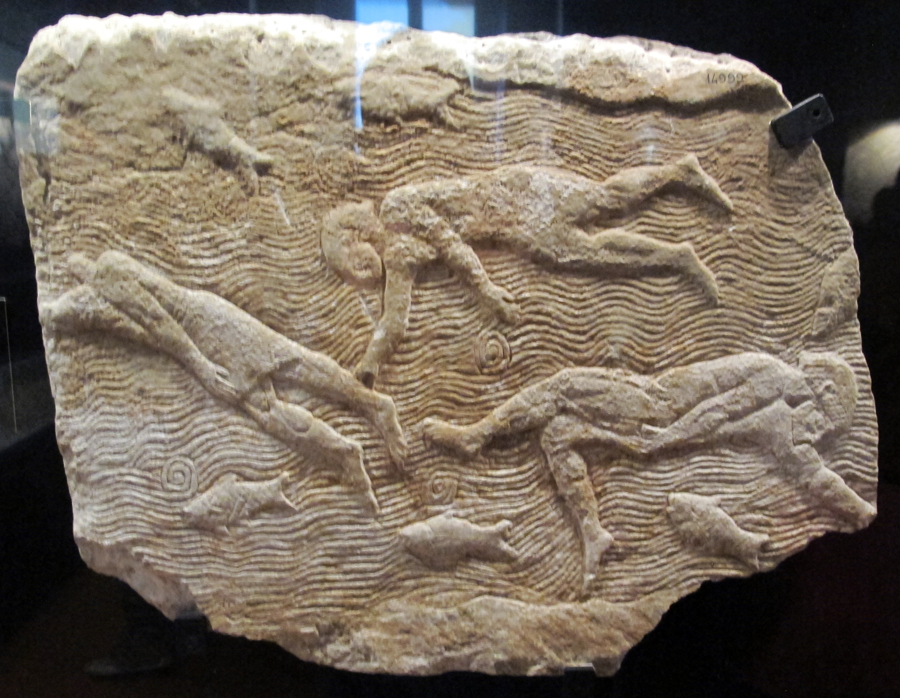 Museo Gregoriano Egizio